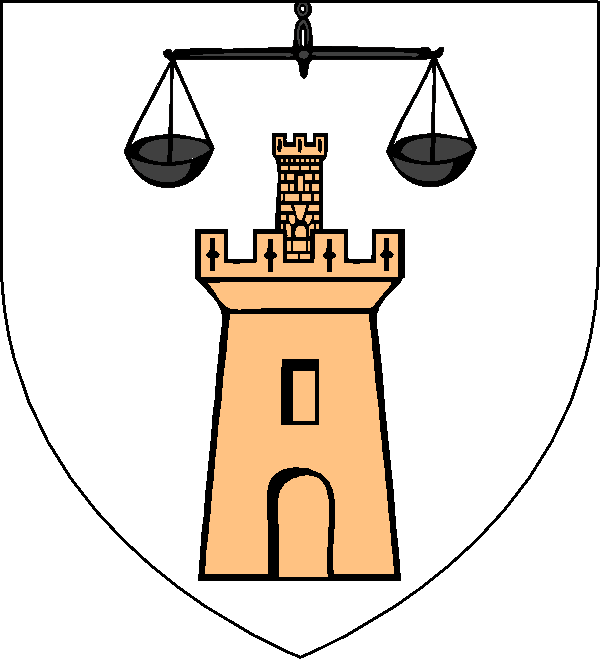 blason de la famille corse della Rocca